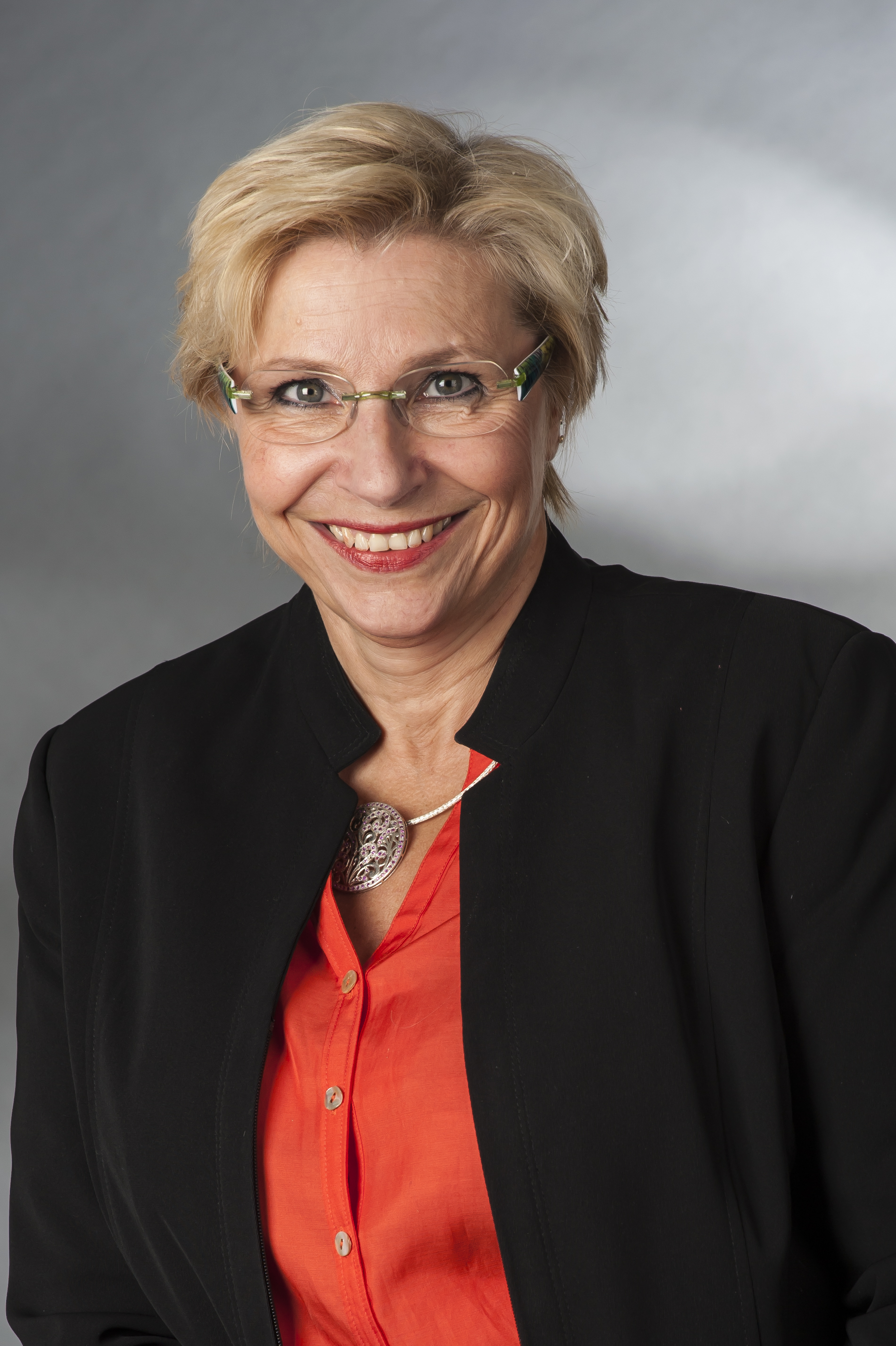 Porträt Petra Ernstberger (SPD)